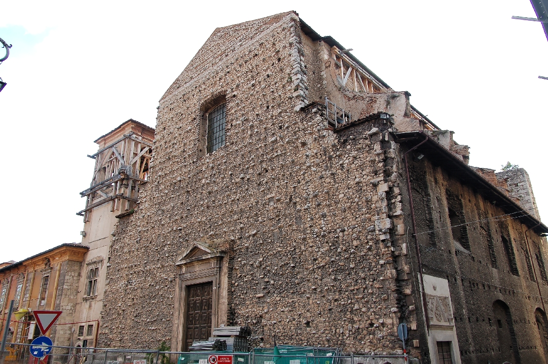 L'Aquila 2011